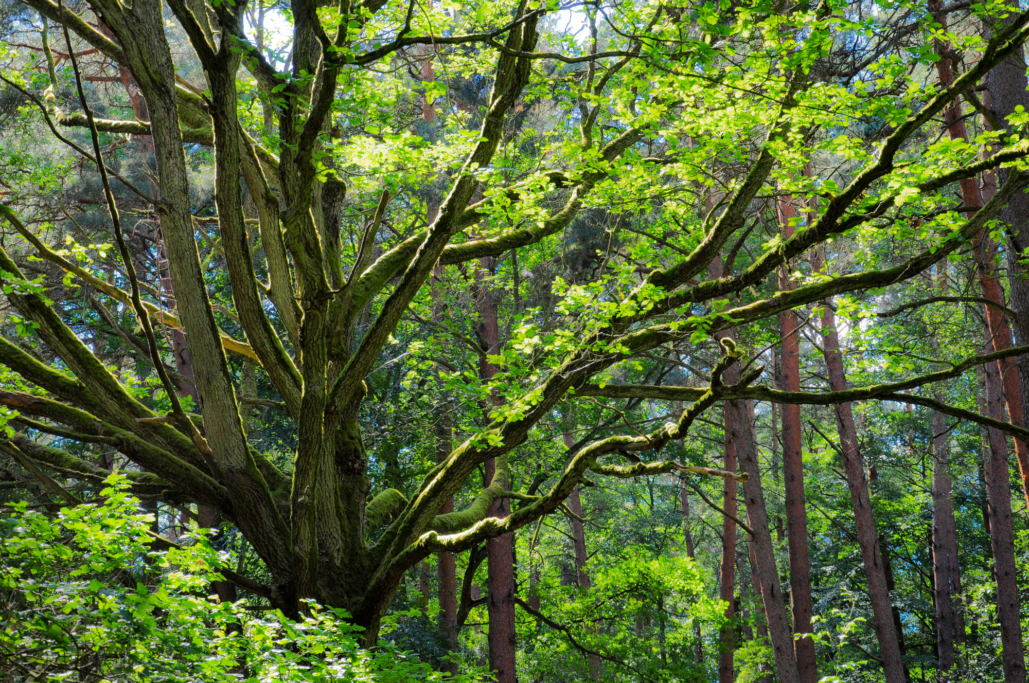 Naturschutzgebiet Kienhorst/Köllnseen/Eichheide: Auch in den gepflanzten Kiefernwäldern des Gebietes wird sich vermutlich im Laufe der Zeit die Eiche wieder durchsetzen.